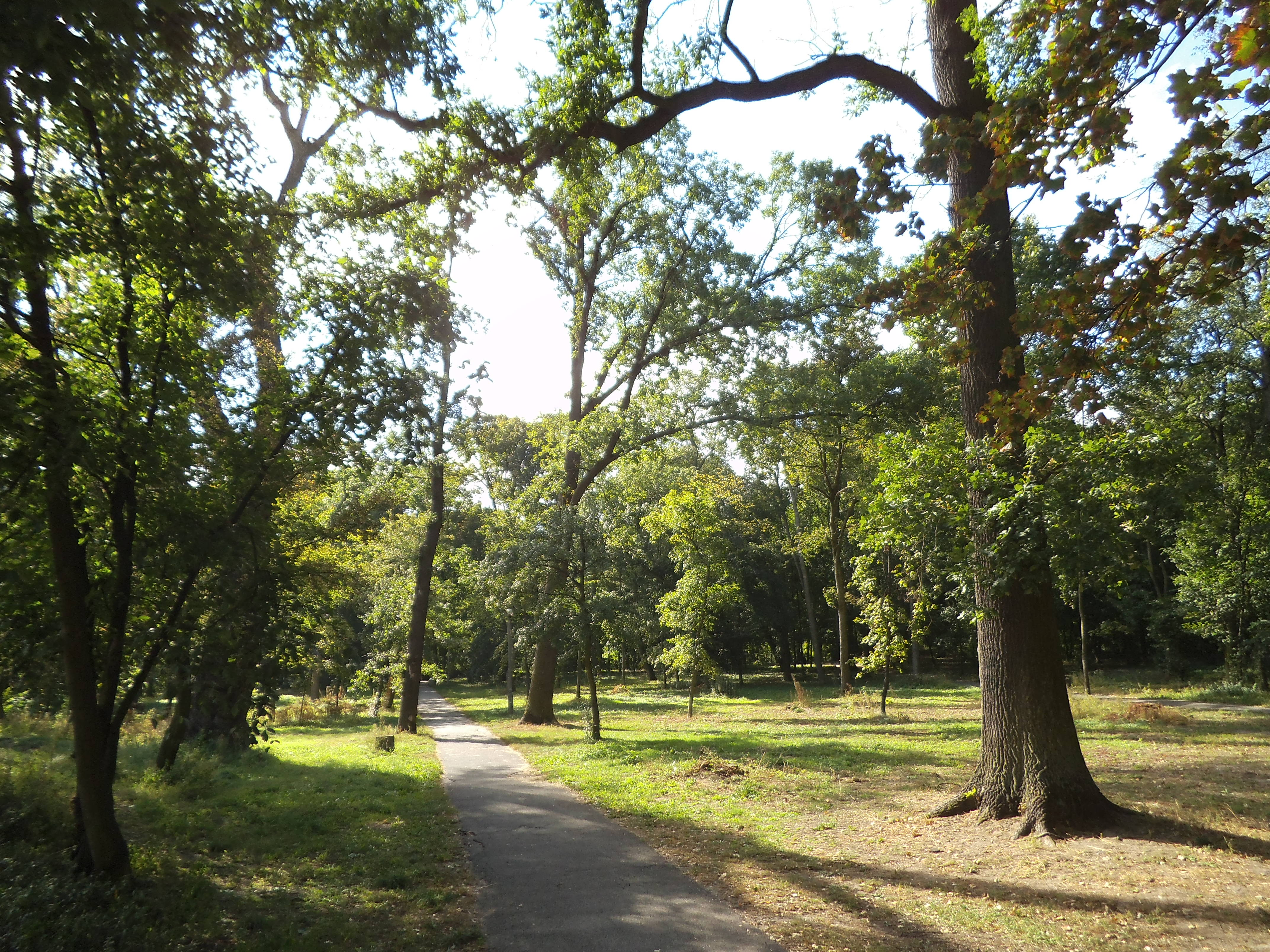 Park Tysiąclecia w Toruniu